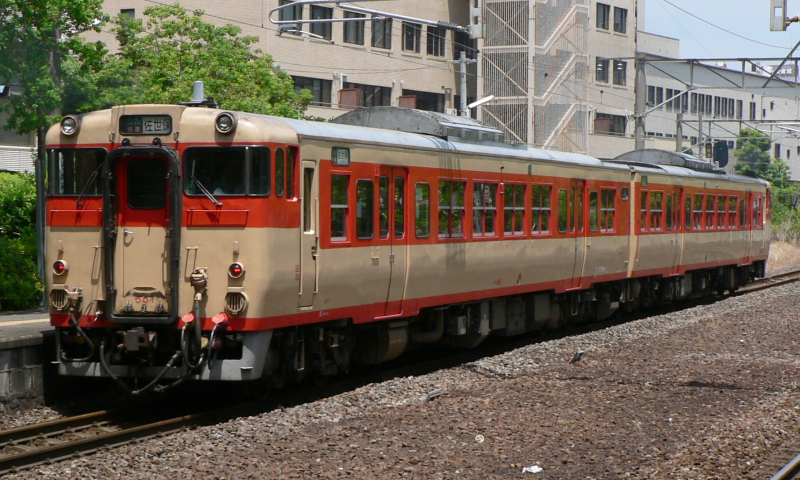 国鉄キハ66系第1編成(国鉄色)